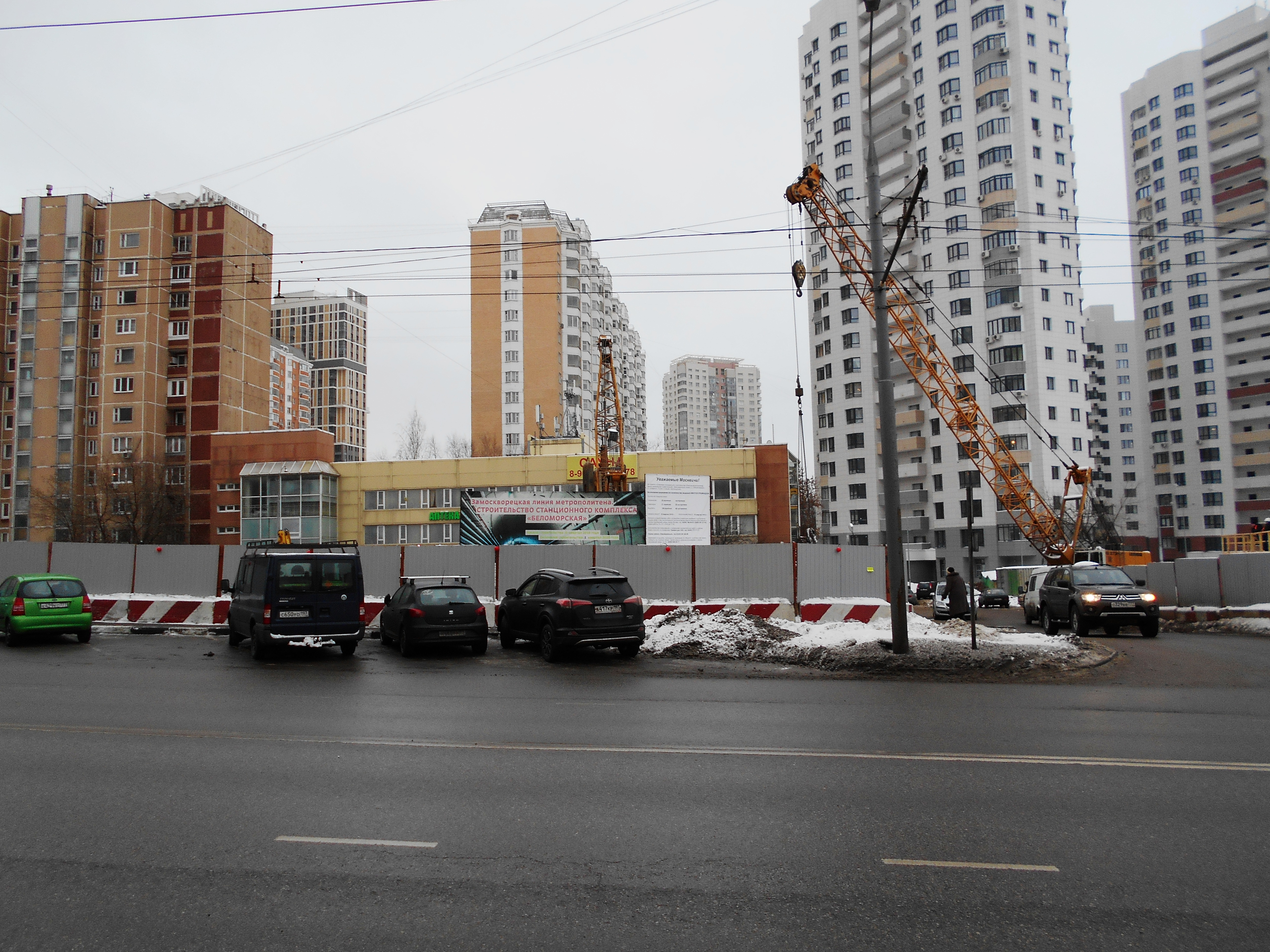 Строительство станции метро "Беломорская". Точка съёмки 55°51’53” с. ш. 37°28’23”